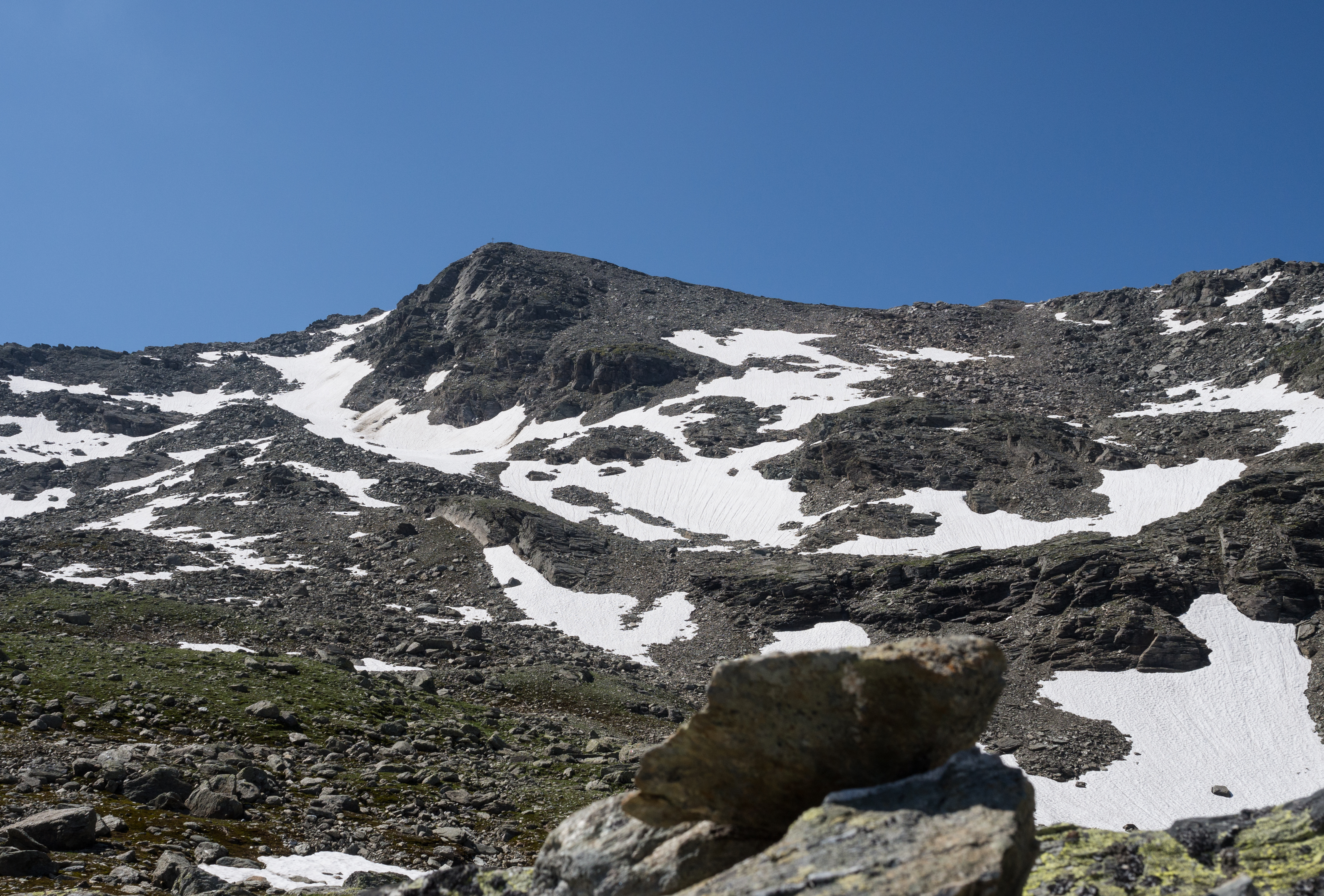 Das Rosenjoch (2796m) in den Tuxer Alpen von Norden gesehen